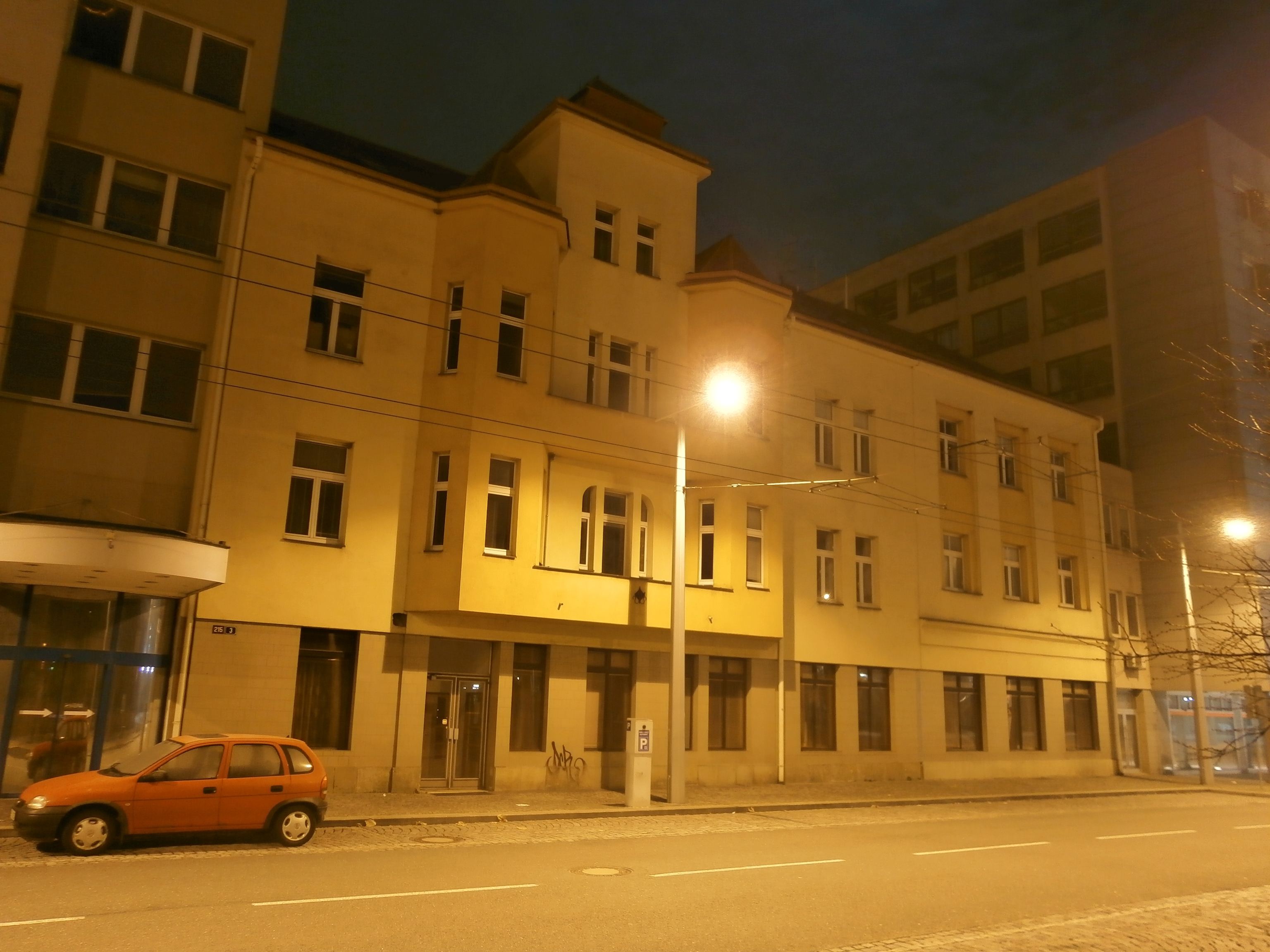 Sladkovského čp. 215 (Hradec Králové)